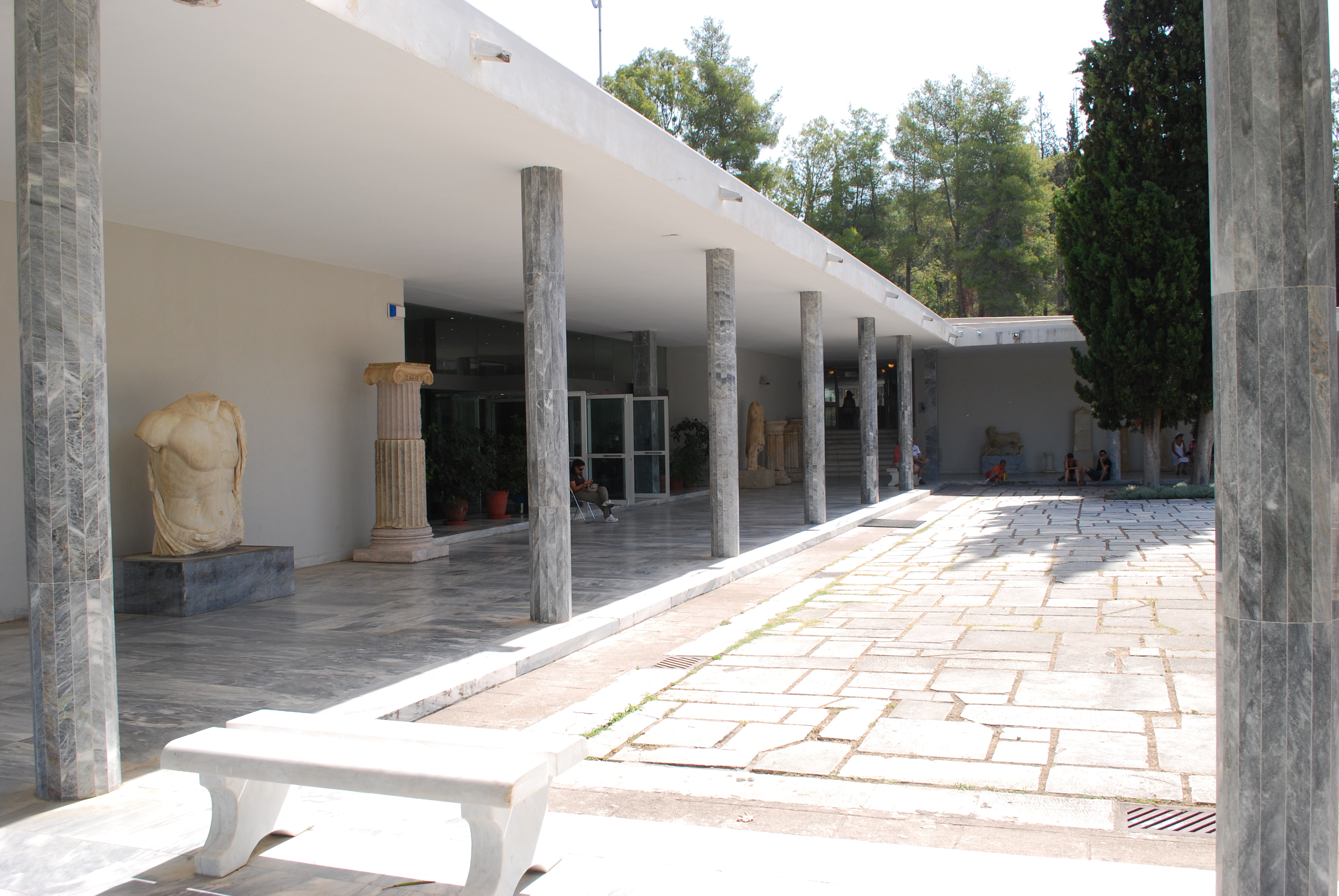 Musée Archéologique d'Olympie.